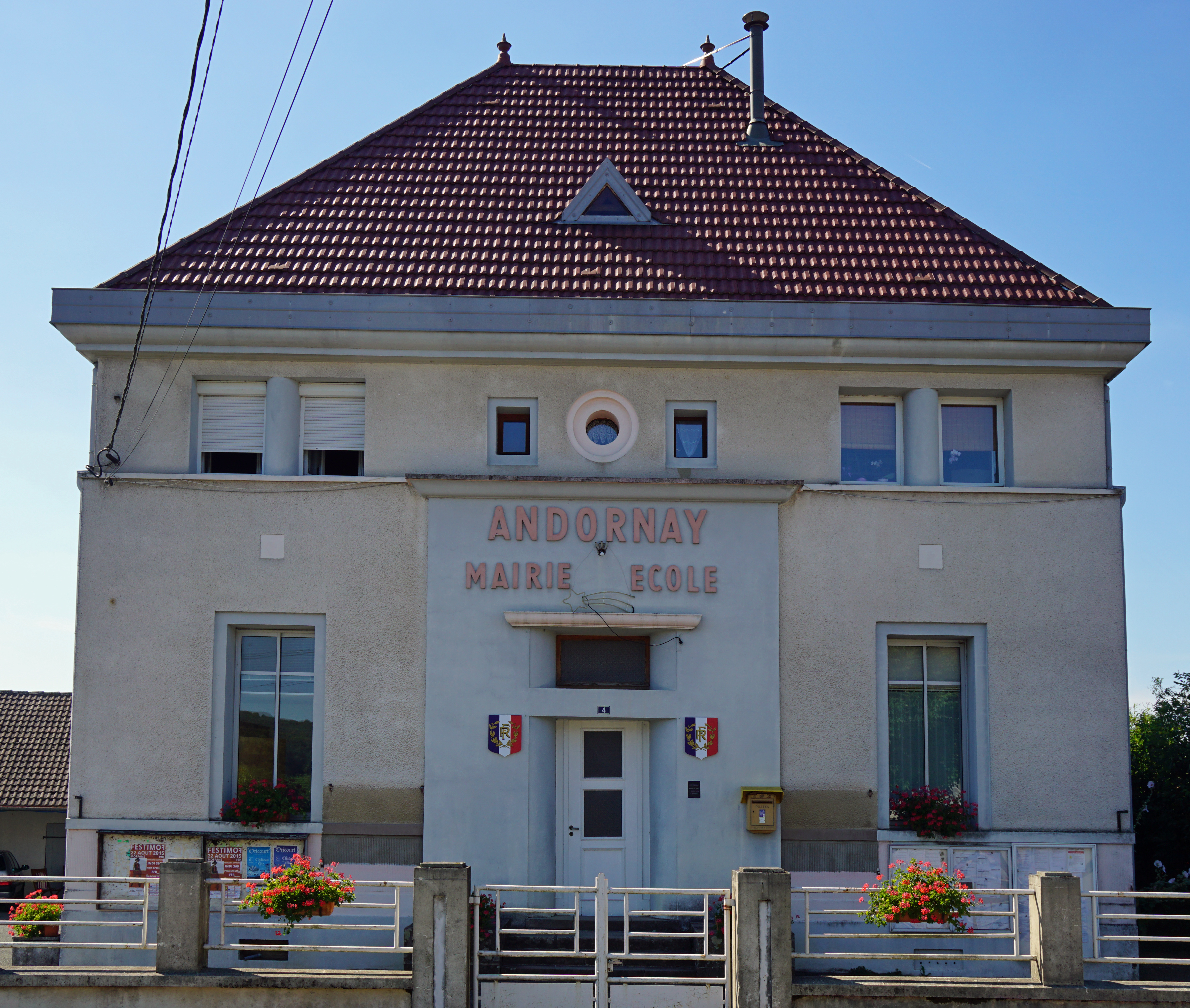 Andornay.